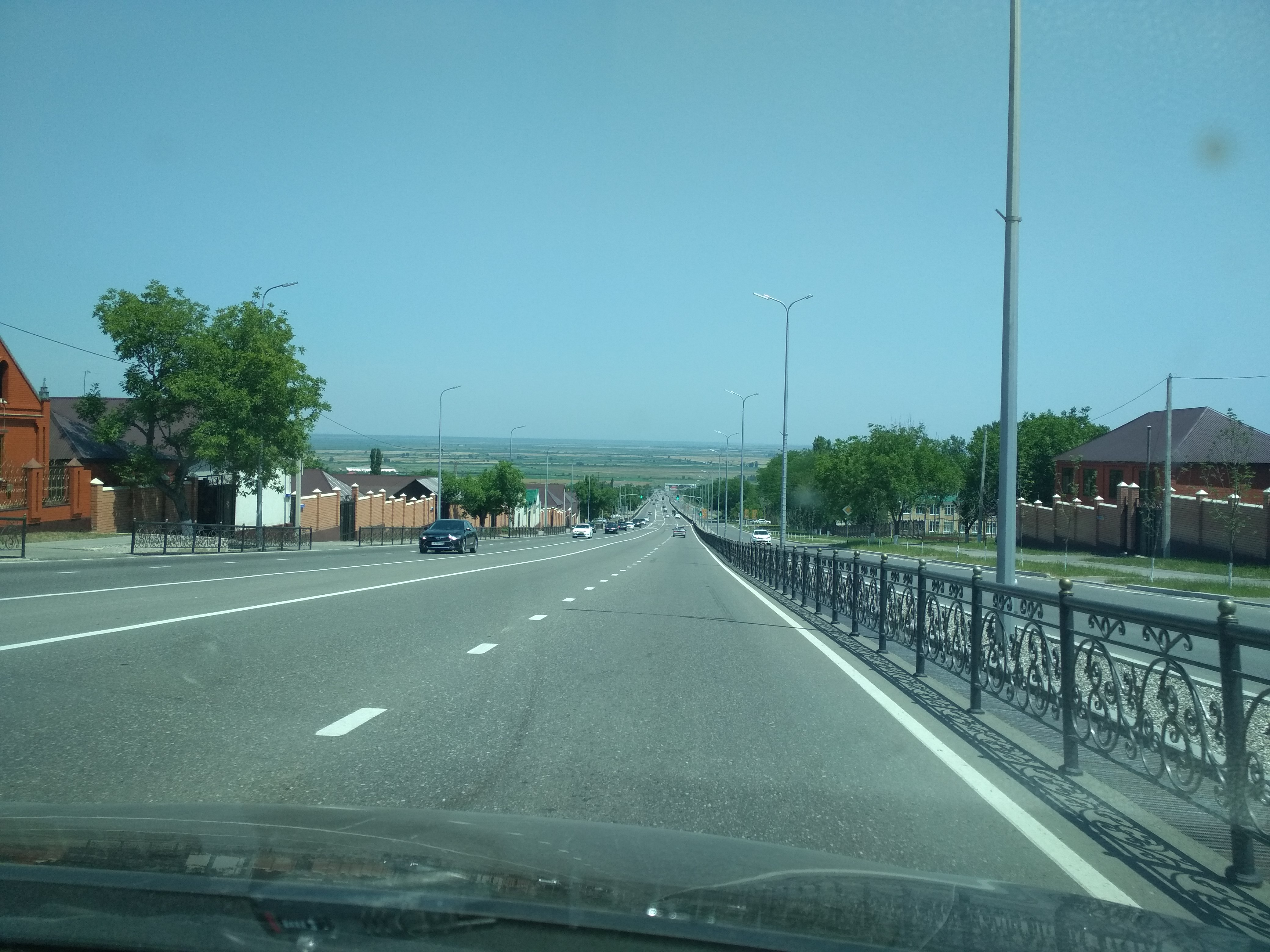 Нохчийн: Ойсхаран юкъ